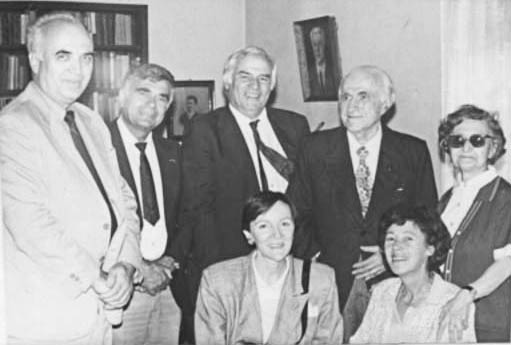 Обсъждането на Лаймската болест: от ляво надясно:доц. Ангелов,д-р Арнаудов, проф. Aeschliman, проф Вапцаров, д-р Вапцарова, д-р Garth, Mme Aeschliman